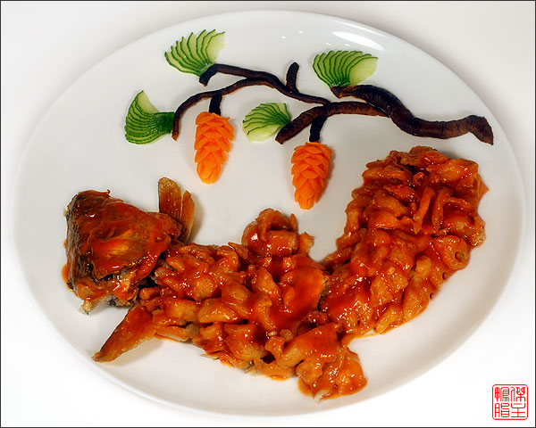 китайское блюдо Squirrel-shaped mandarin fish